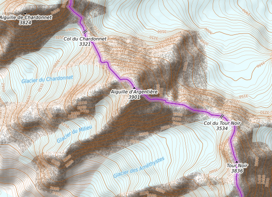 carte réalisée sur umap This map may be incomplete, and may contain errors. Don't rely solely on it for navigation.